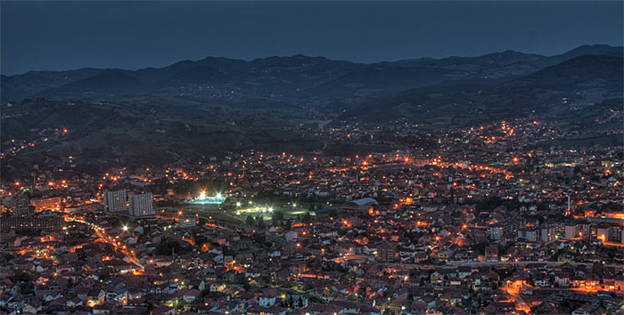 Noční pohled na město Novi Pazar, Srbsko